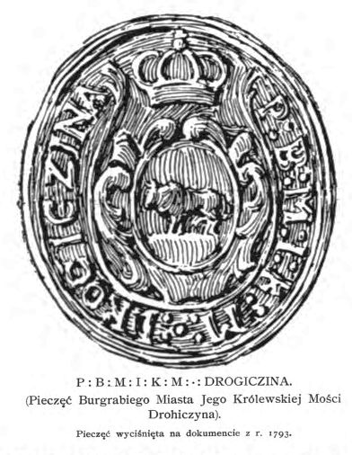 Pieczęć miasta Drohiczyna wyciśnięta w 1792 roku.